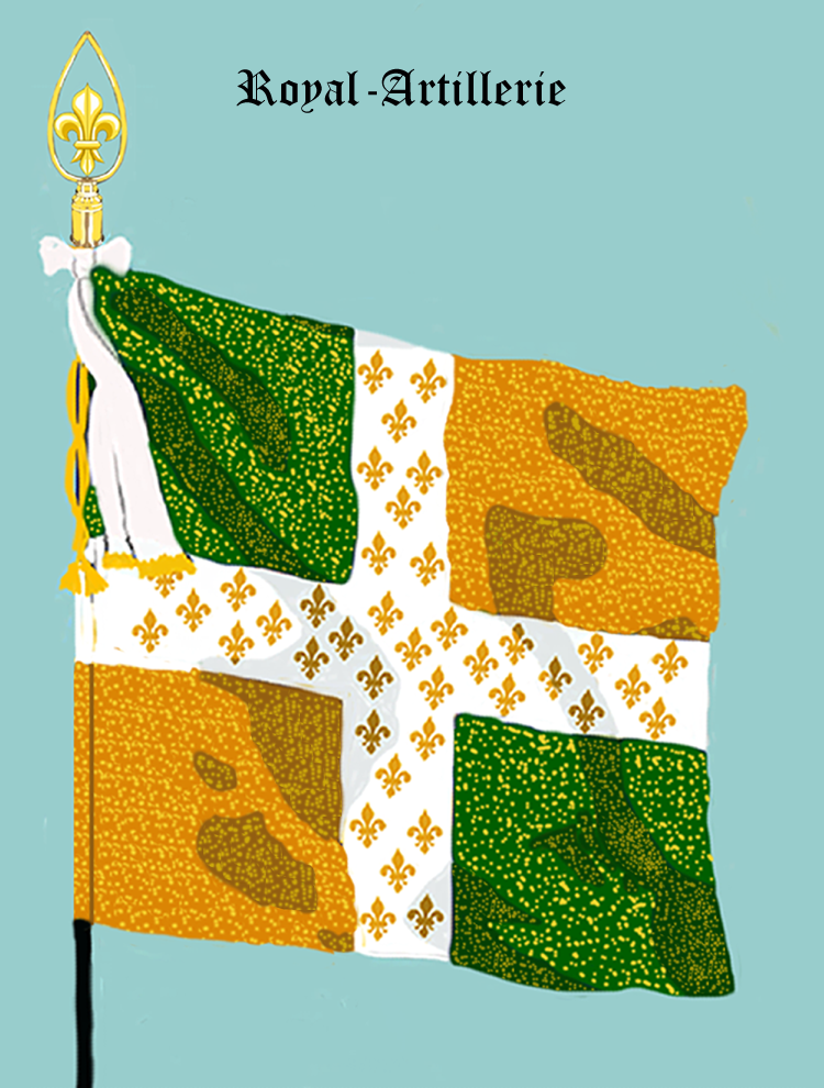 Ordonnanzfahne des königlich französischen Regiments „Royal-Artillerie“. - Entnommen und überarbeitet aus: „LES UNIFORMES ET LES DRAPEAUX DE L'ARMÉE DU ROI“ Marseille 1899. (Drapeau d'Ordonnance du régiment française „Royal-Artillerie“.)